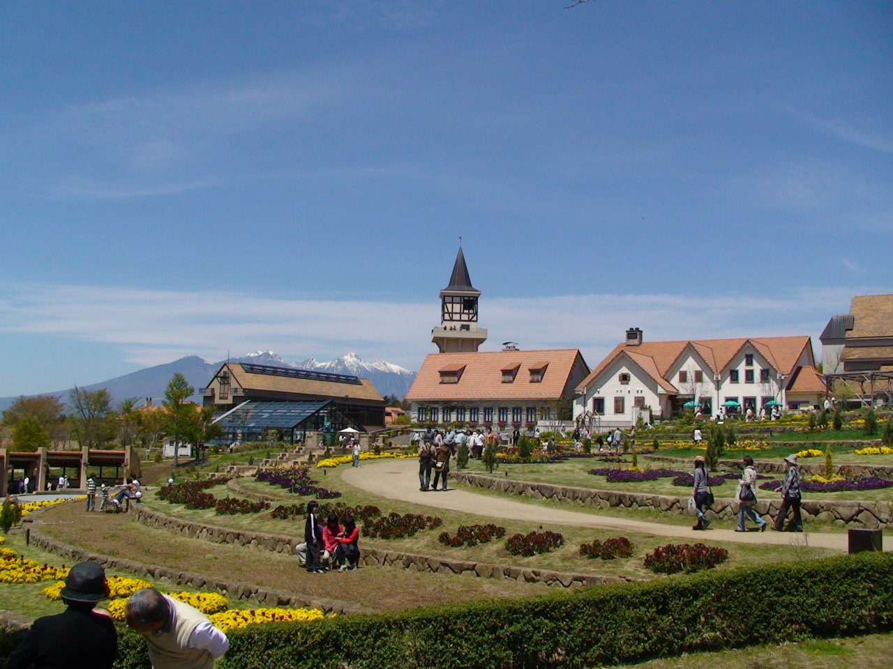 明野ハイジの村